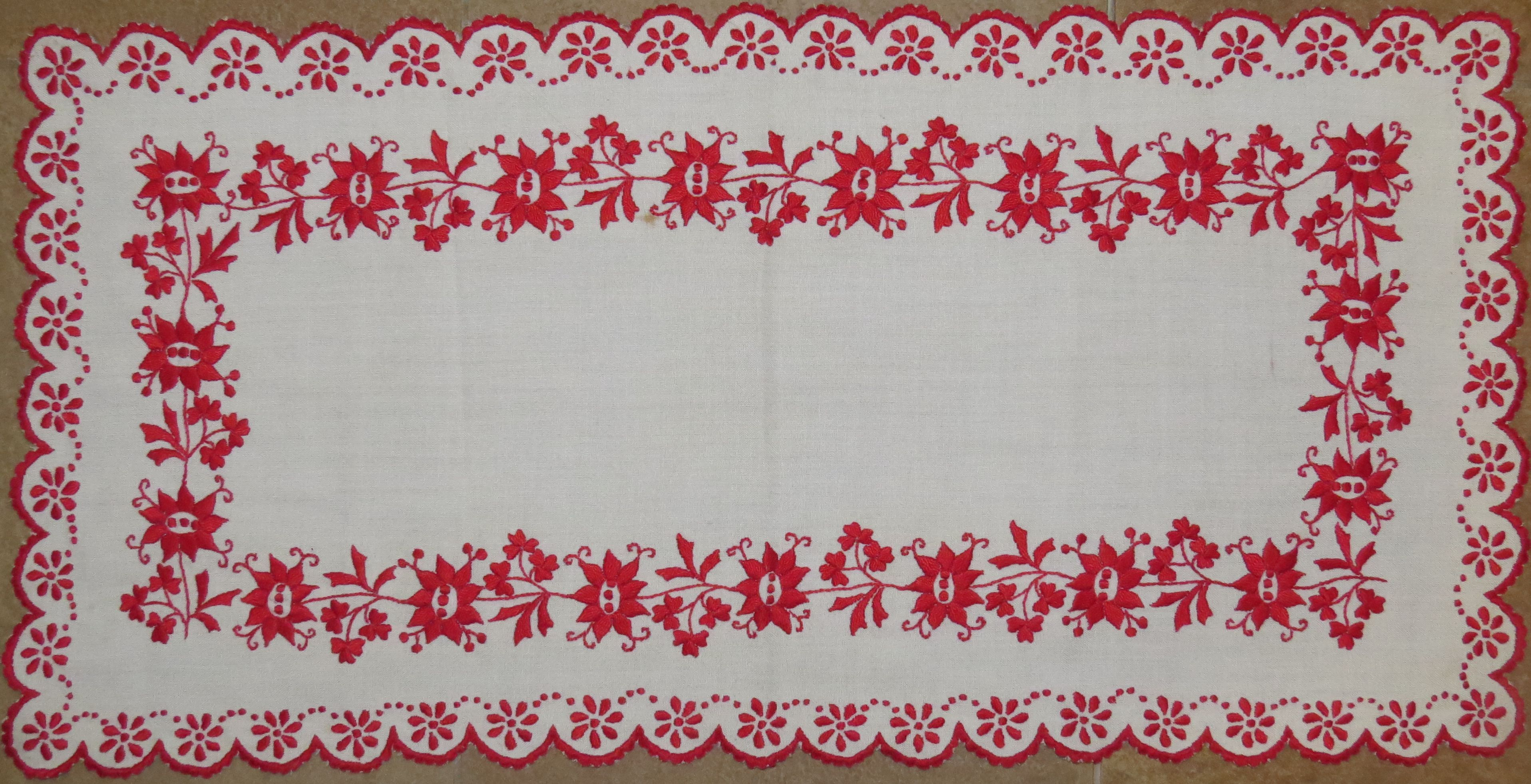 Furtai hímzés piros pamuttal, fehér vászonra.